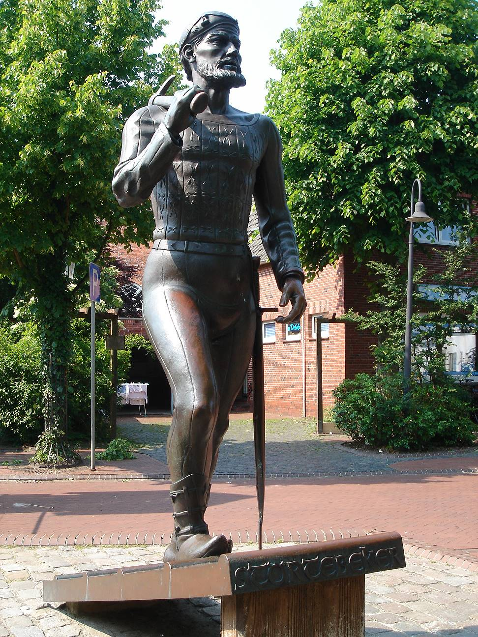 Klaus Störtebeker Denkmal in Marienhafe von Karl-Ludwig-Böke 1992 (Guss Barth Elmenhorst)